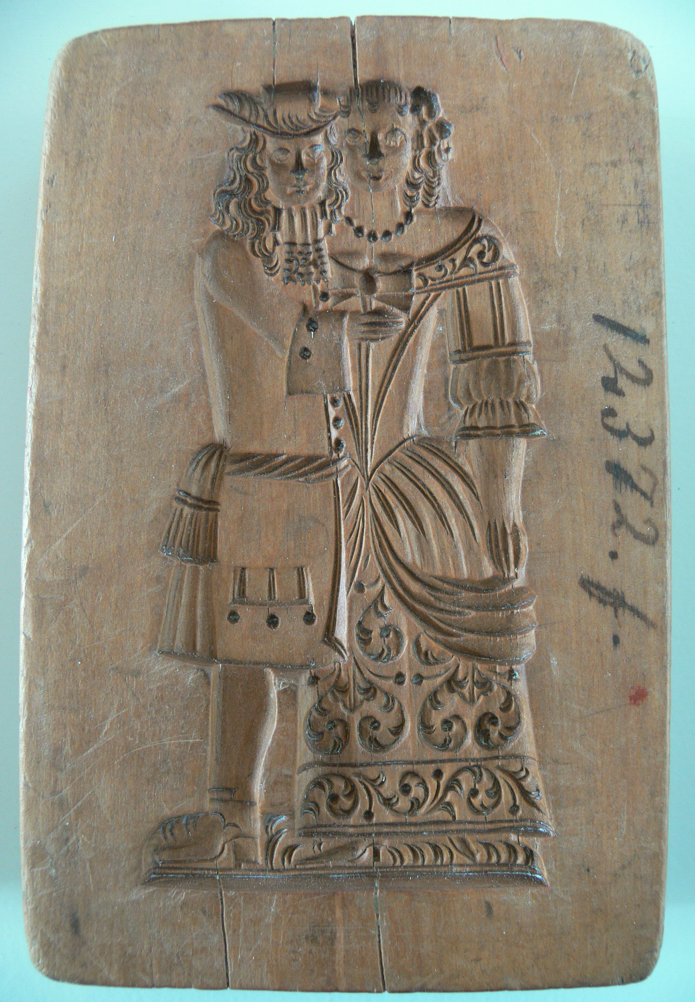 Springerlemodel, 18. Jh. Landesmuseum Württemberg (Außenstelle Museum für Volkskultur in Württemberg, Waldenbuch)